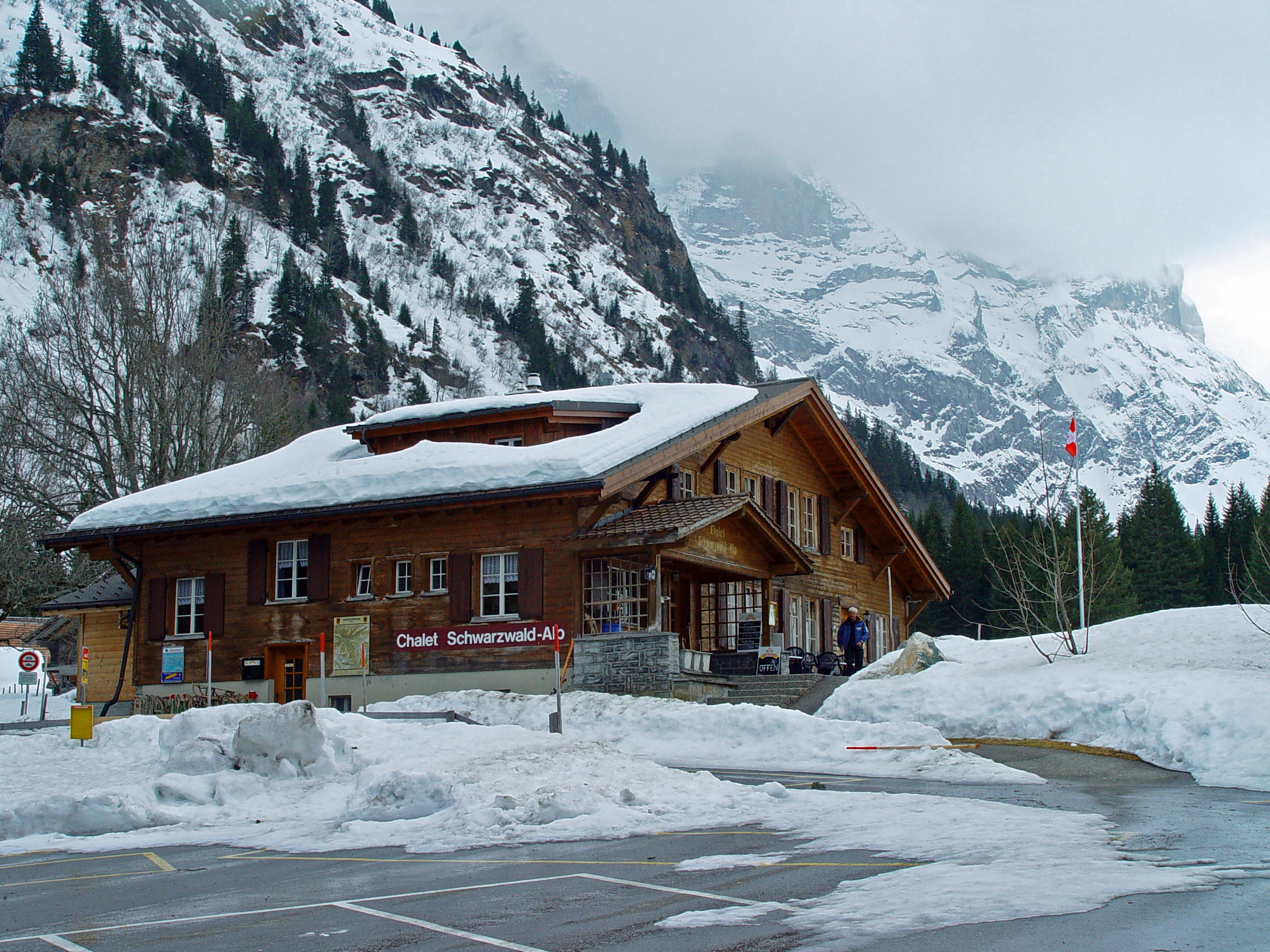 Schwarzwaldalp im April